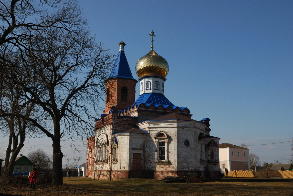 Баркалабава. Царква Казанскай іконы Божай Маці